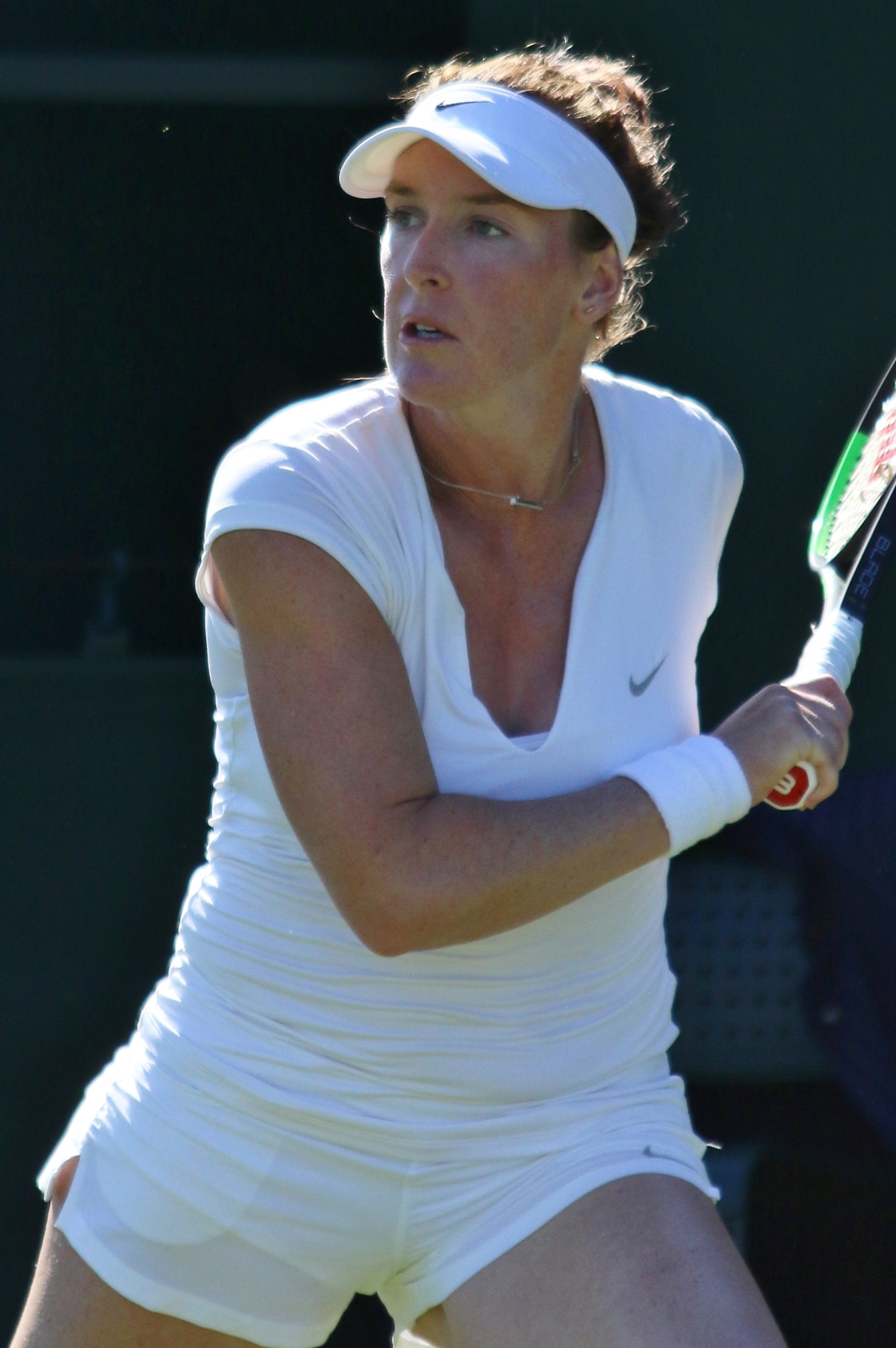 Brengle WM18 (27)